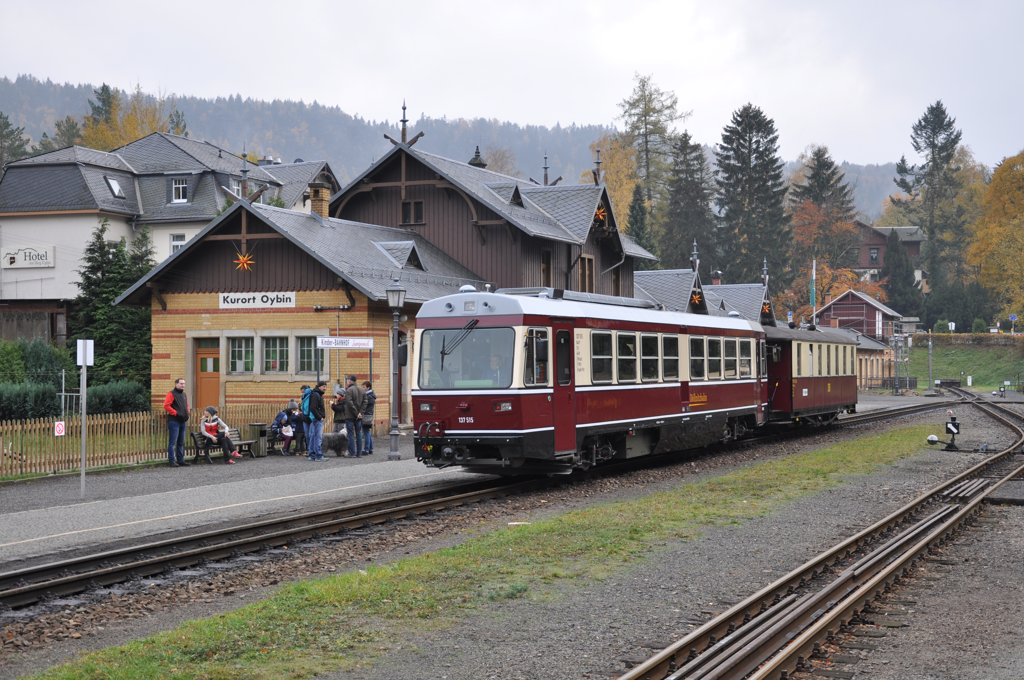 Triebwagen 137 515 (ehem. ÖBB 5090.015) der Döllnitzbahn in Kurort Oybin während der öffentlichen Präsentationsfahrten nach Inbetriebnahme.